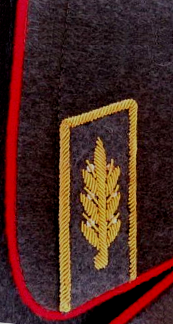 шинельная петлица генералов